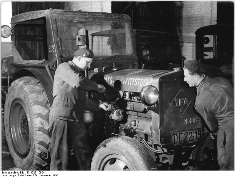 Wittstock, Reparatur eines Schleppers Zentralbild Junge 29.12.1955 MTS Wittstock schafft 50% des Reparaturprogramms bis zum 31.12.1955 Gute Erfolge bei der Winterreparatur erreichte bisher die MTS Wittstock, Bez. Potsdam, die vor etwa einem Monat alle Maschinen- und Traktorenstationen der Republik zu einem Wettbewerb zur vorfristigen Beendigung des Winterreparaturprogramms aufrief. In ihrem Kampfprogramm hat für die Frühjahrsbestellung bis zum 31.1.56 50% aller Erntebergungsmaschinen zu reparieren. Die Station wird auch dafür sorgen, dass alle Maschinen und Geräte der LPG ihres Bereiches bis zum 15.2.56 einsatzfähig sind. UBz: Die Reparaturbrigaden der MTS Wittstock stehen untereinander im Wettbewerb.-(Links): Schlosser Gerhard Block und (rechts): Schlosser Werner Runge von der Traktoern-Reparaturbrigade:"Roter Partisan" setzen einen Traktor instand.